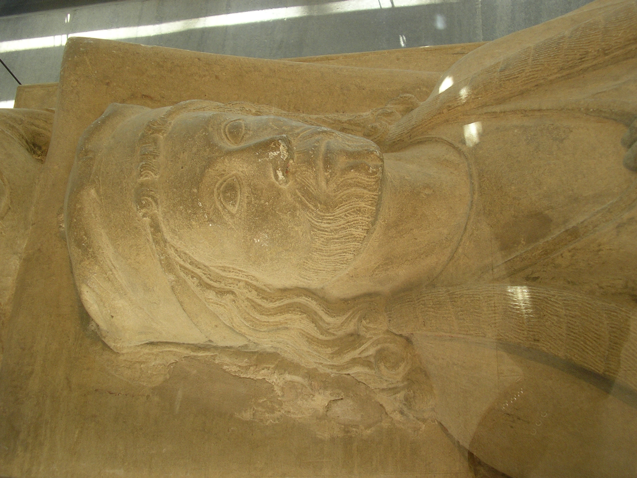 Arnd von Gröpelingen († 1304), Grabfigur. Focke-Museum Bremen, Leihgabe der St.-Ansgarii-Gemeinde Bremen. Kalksandstein. Detail.